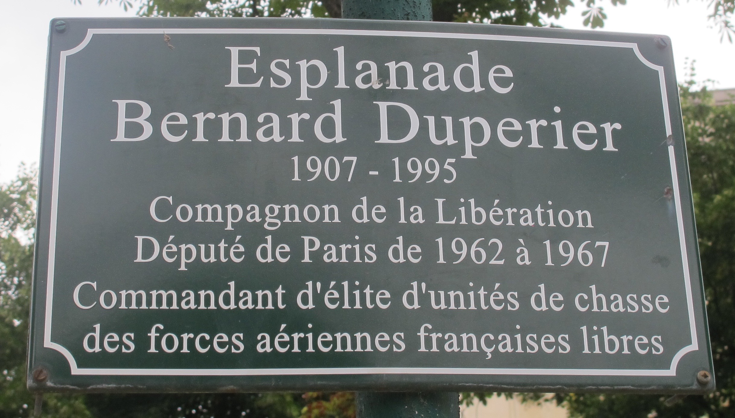 Plaque "Esplanade Bernard Duperier", nommée en l'honneur du résistant et homme politique, dans les jardins du Trocadéro (Paris, 16e).